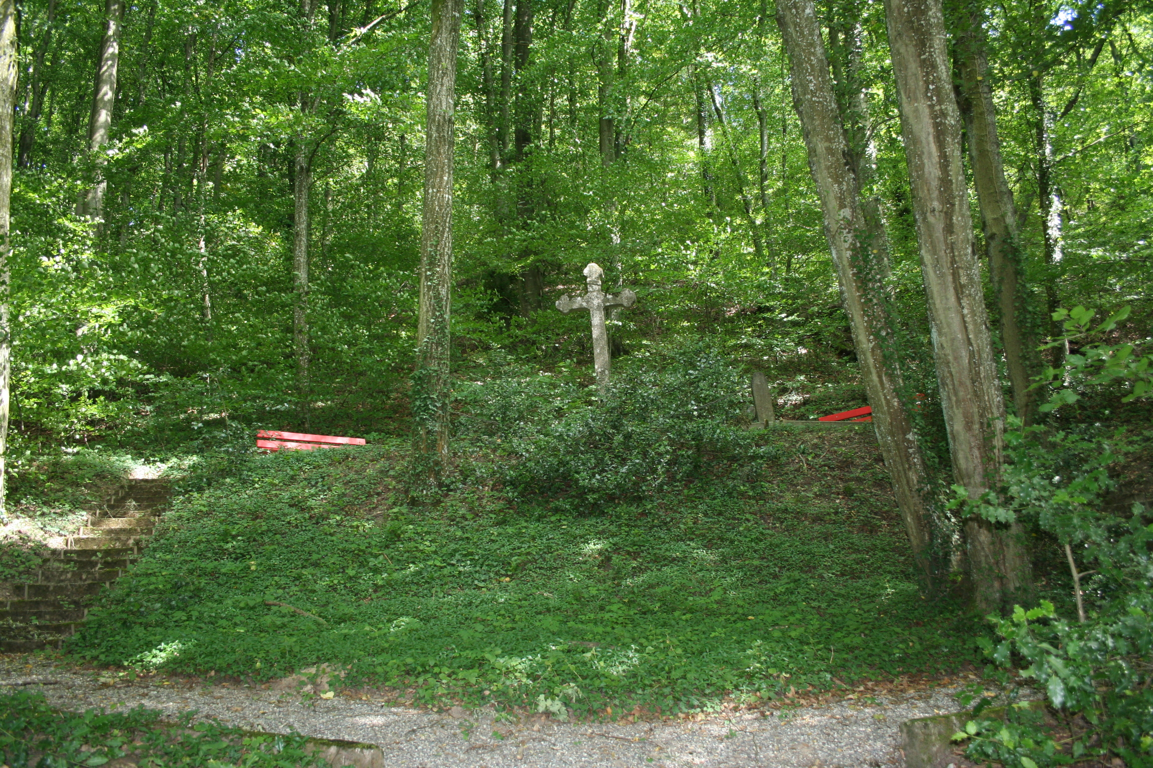 Klingnau Kaiserlicher Gottesacker